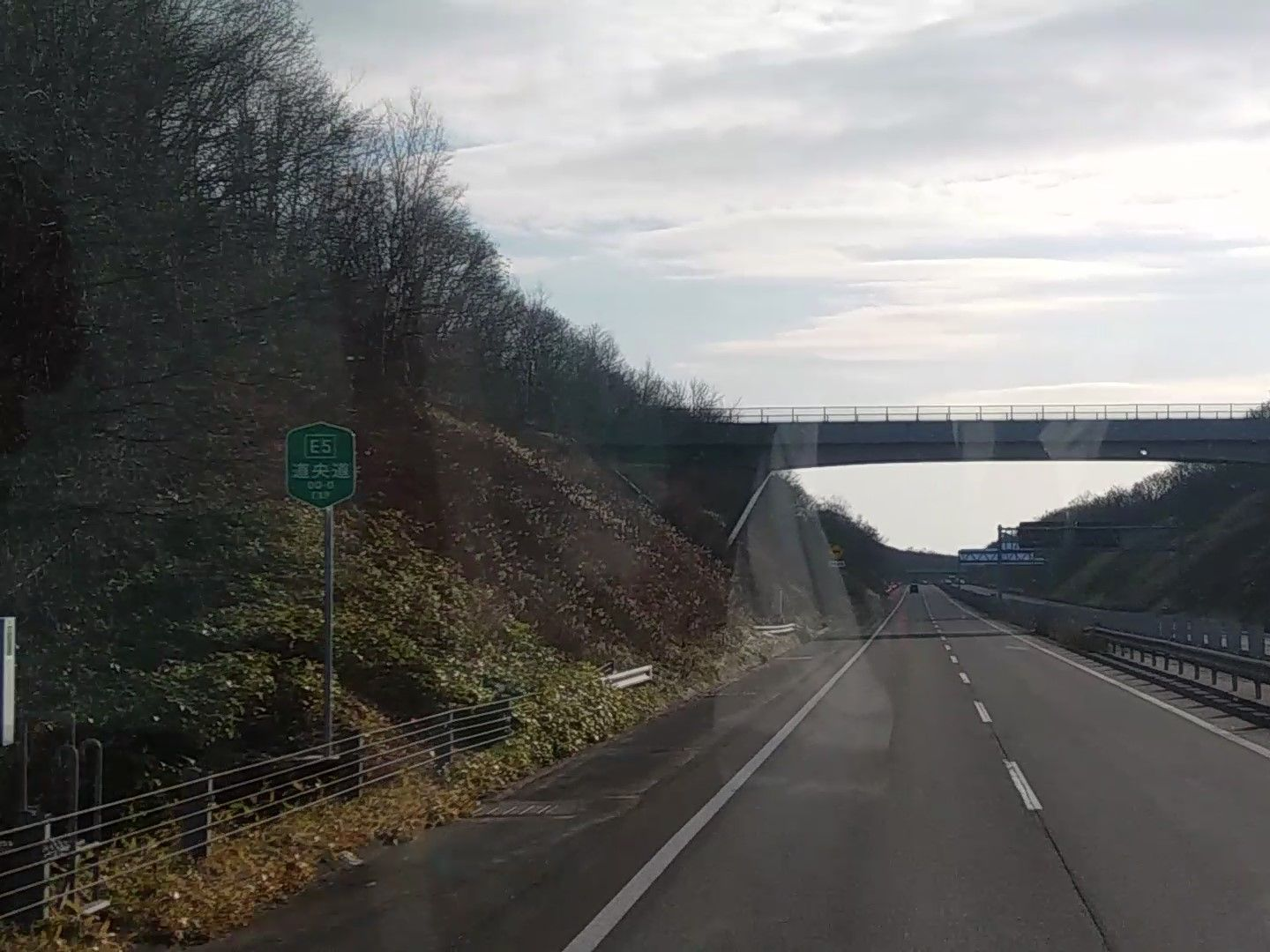 苫小牧東インターチェンジ・合流部直後の高速道路名及び高速道路番号標識（札幌側から、2018年12月撮影）英文表記が「DO-O EXP」となっている